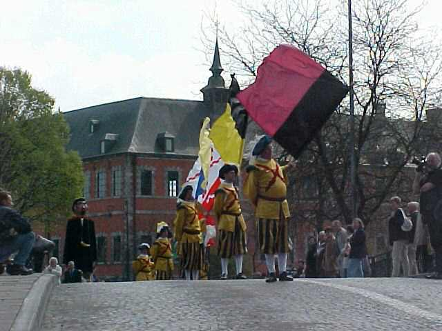 Les Alfers